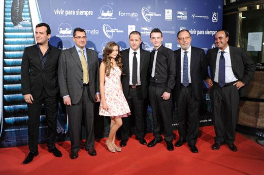 Estreno Vivir para siempe